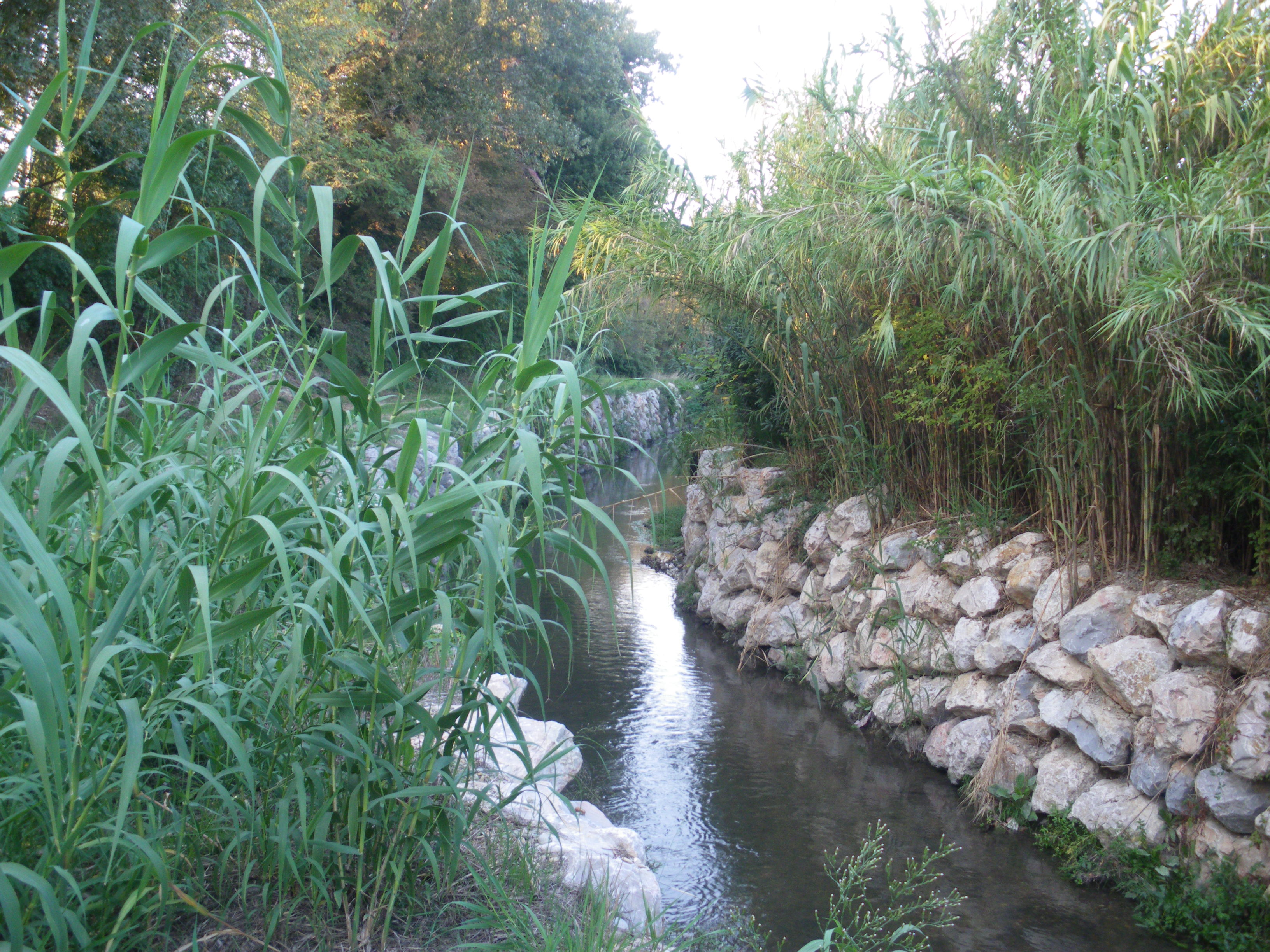 Canal du Crillon, Vaucluse, France